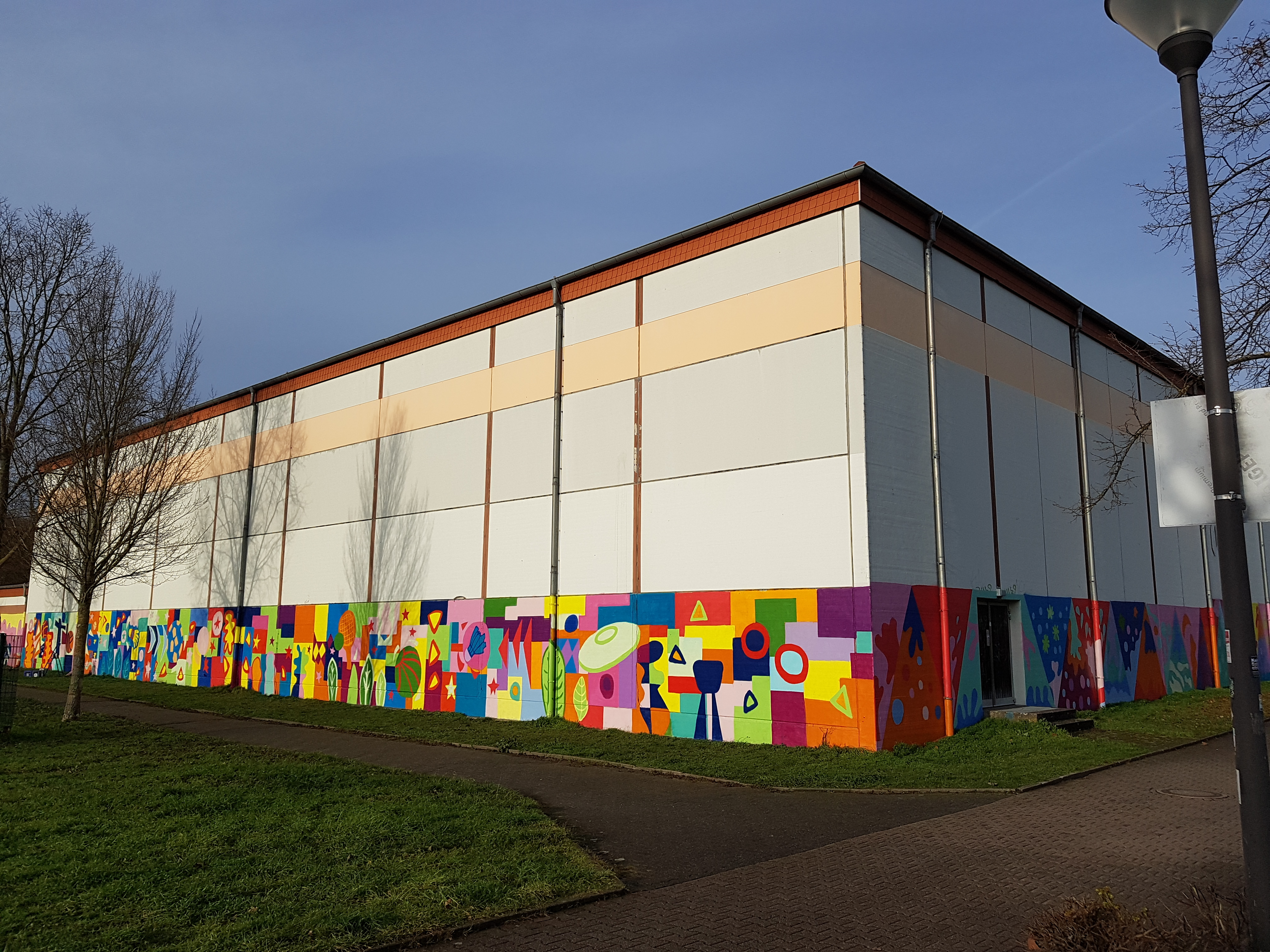 Aufwertung der Sporthallenfassade: Kunstprojekt des AFG Werne